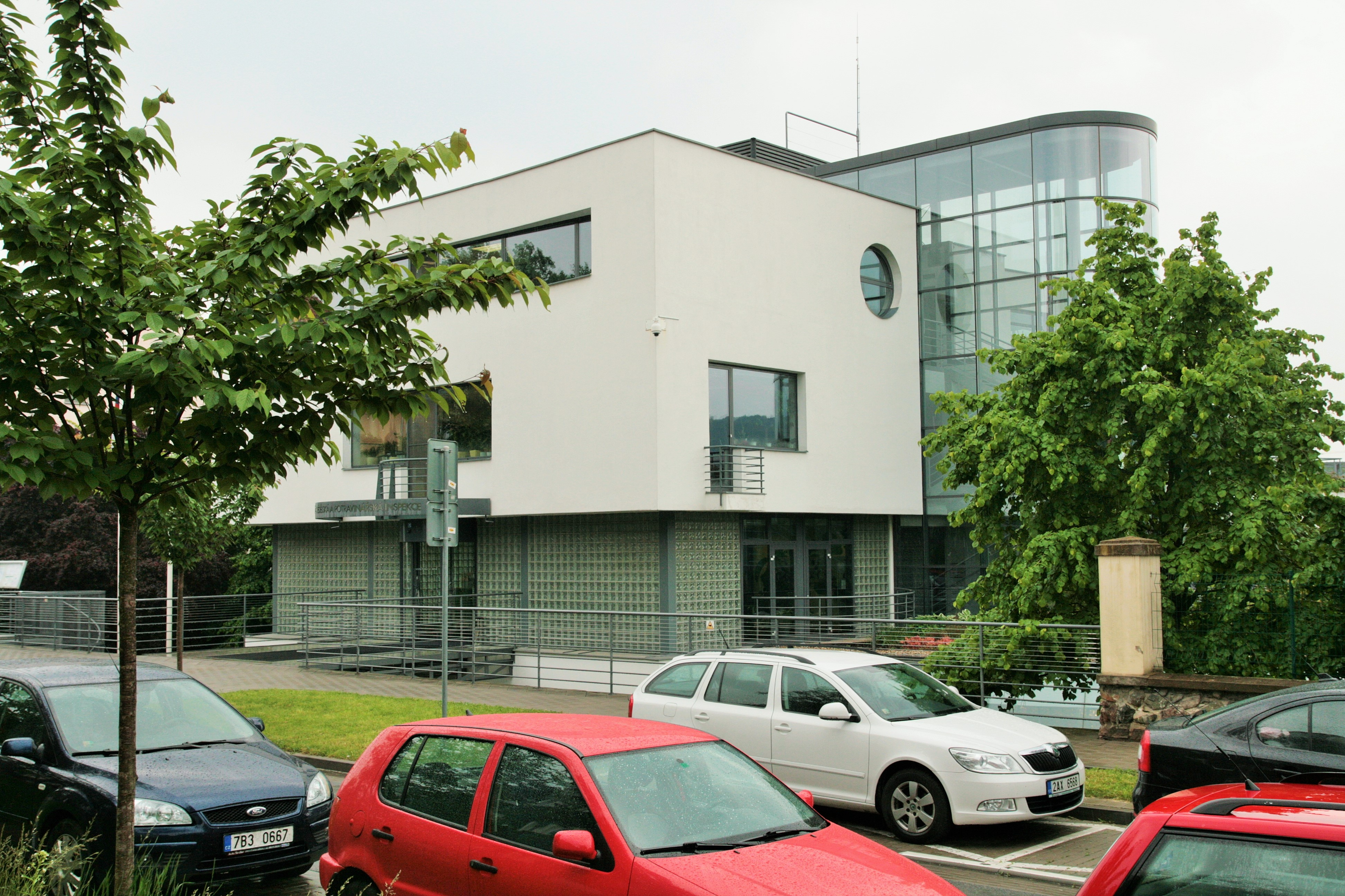 Budova Státní zemědělské a potravinářské inspekce, Květná 504/15, Brno. Ústřední inspektorát, pohled od severozápadu.